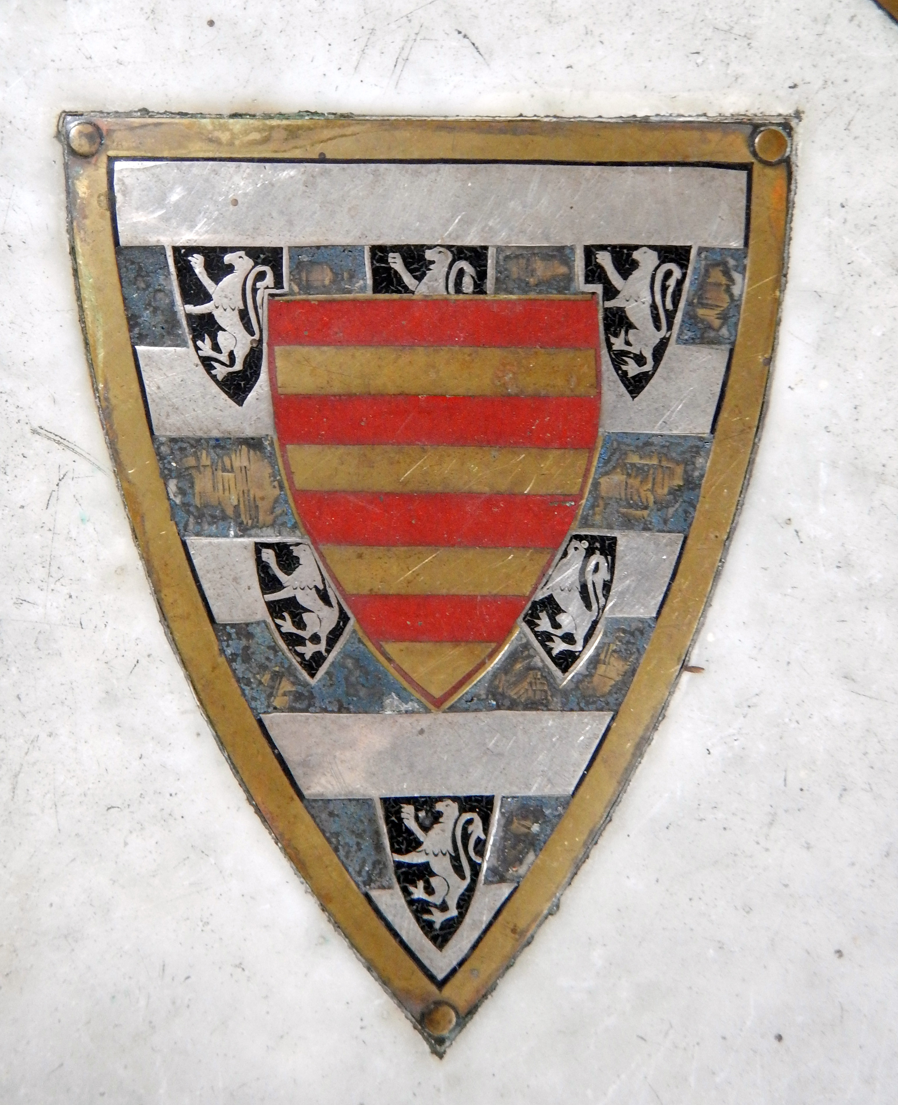 Intérieur de l'église Saint-Martin de Stamford (St Martin's church) L'église actuelle date de la fin du 15ème siècle (construite dans les années 1480) et remplace un bâtiment plus ancien, probablement détruit après le sac de la ville en 1461. Mais d'autres églises ont été peu endommagées, elle a peut-être été négligée par les religieuses qui à l'époque en avaient la charge. Arms: Cecil with inescutcheon of Poyntz: Brownlow Cecil, 2nd Marquess of Exeter (1795-1867), KG, married Isabella Poyntz (1803-1879)